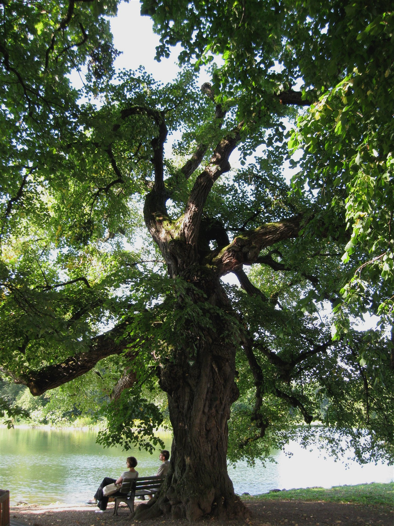 Sommerlinde am Badenburger See, Nymphenburg, München